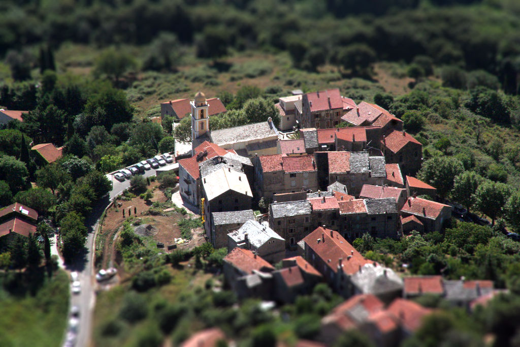 Village de santa maria poghju